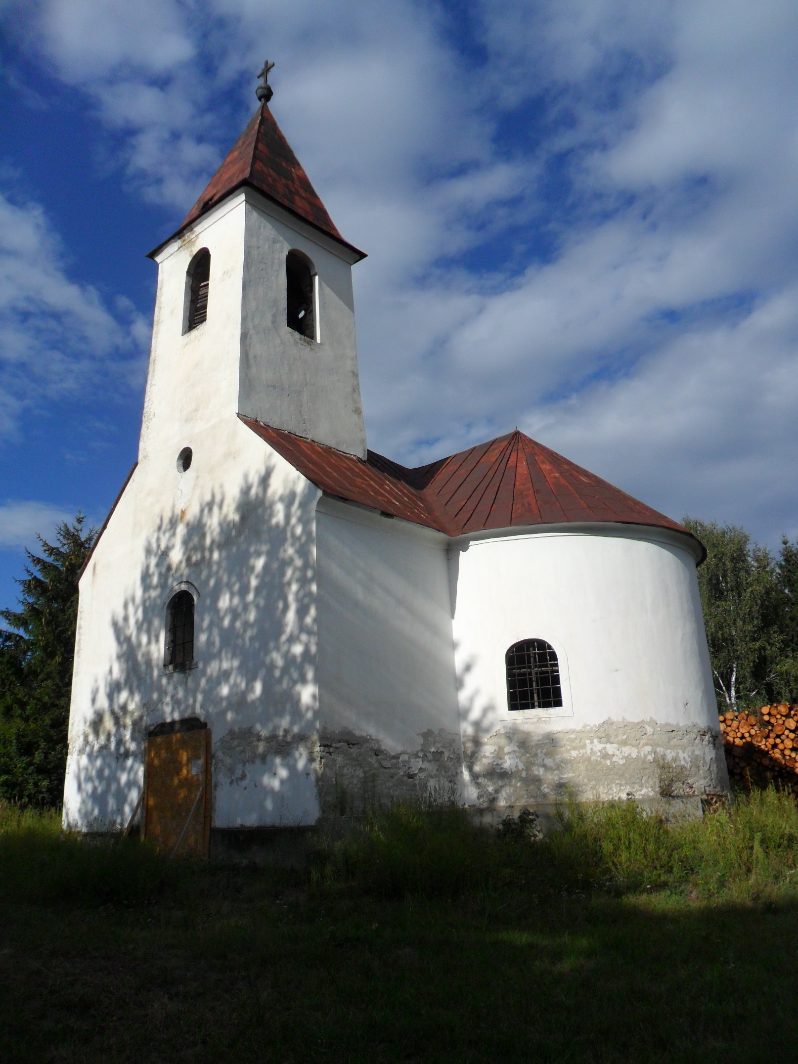 Zélpusztai kápolna (Zalaszentgyörgy), építtette boldogfai Farkas Ferenc (1713–1771) zalai alispán 1767-ben